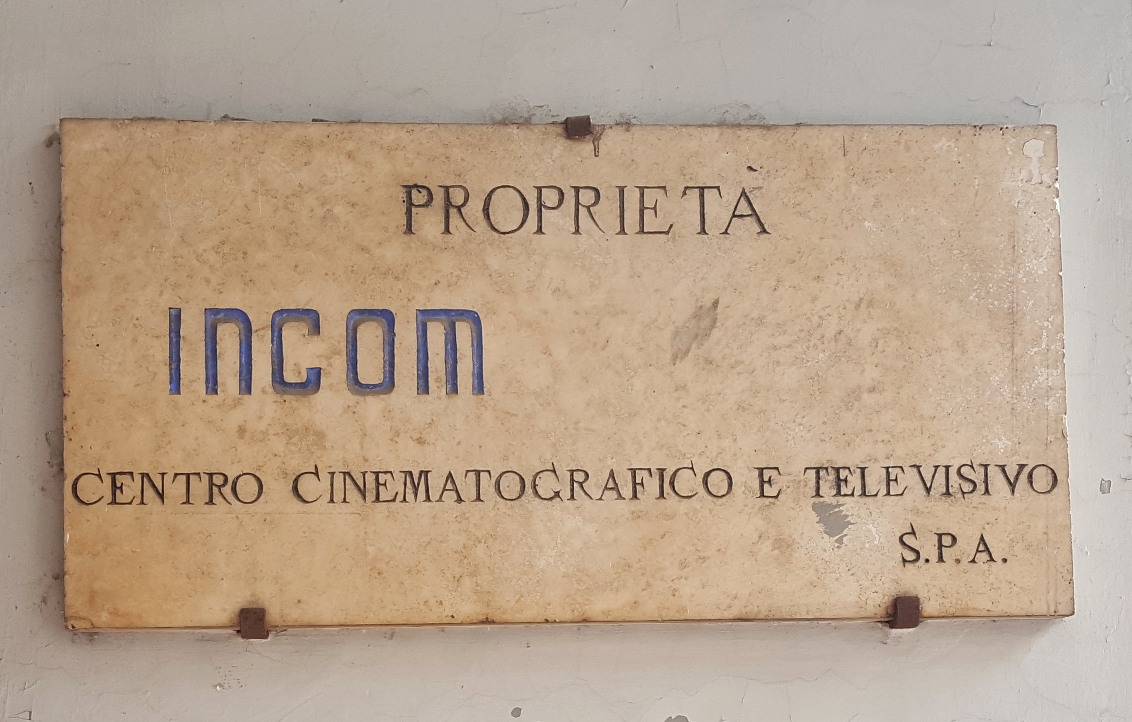 Targa posta negli studi televisivi RAI di Roma - Via Romagnoli (CPTV Nomentano), ex stabilimenti INCOM